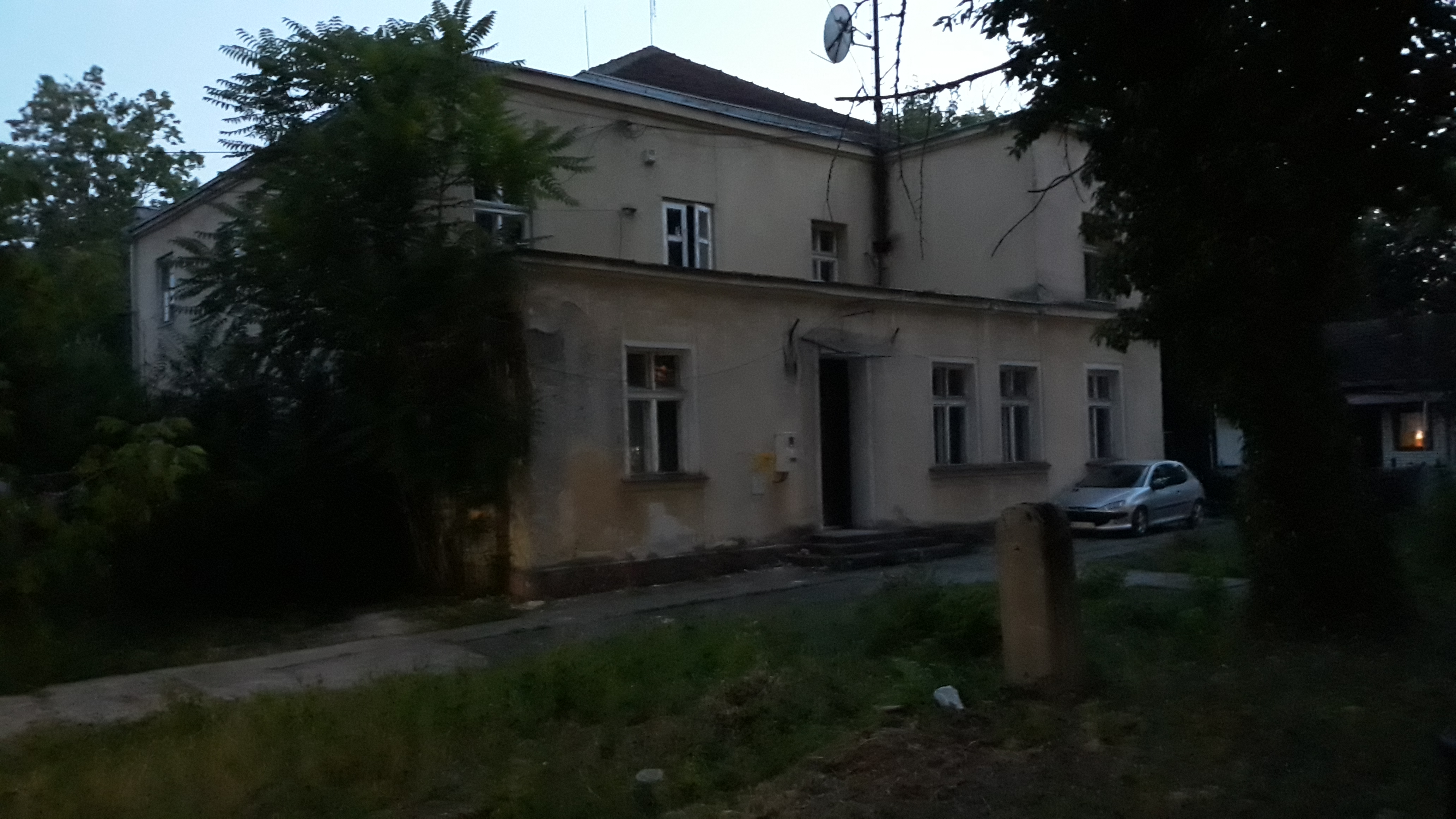 Стара зграда „Аутомонтаже“